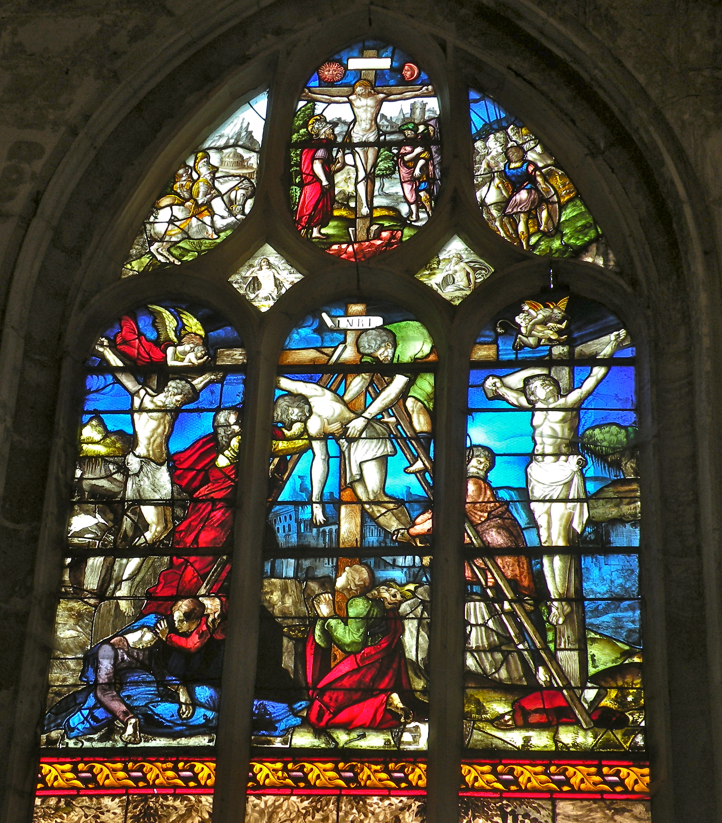 Baie n° 10 (déambulatoire, sud) : Crucifixion avec saint Longin et des cavaliers, Descente de croix avec les deux larrons.